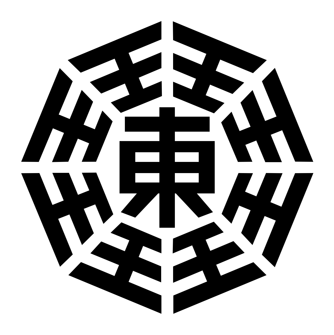 東京都立八王子東高等学校の校章を図表描画ソフトにて作成しました。